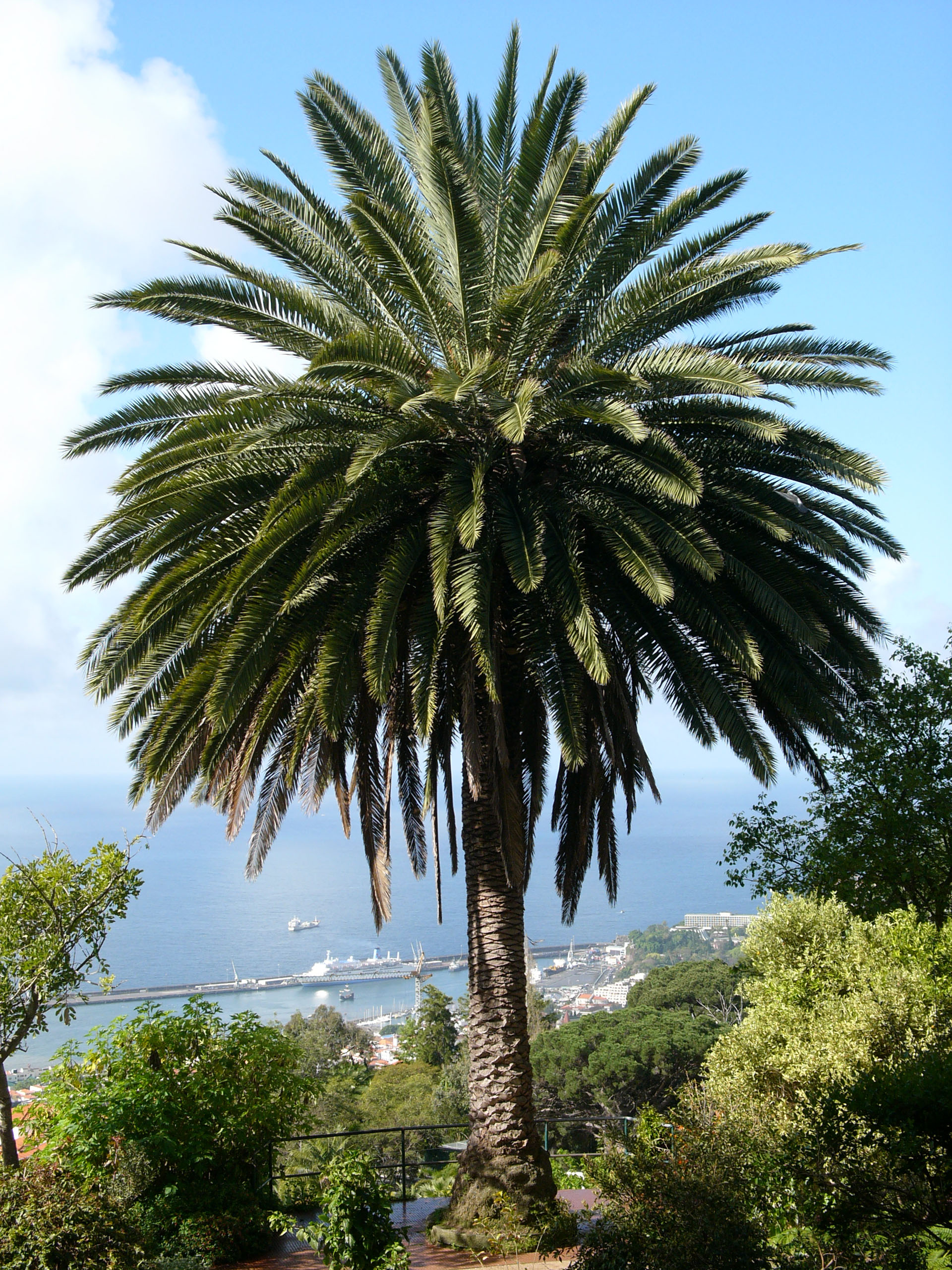 Phoenix canariensis, Botanical Garden, Madeira